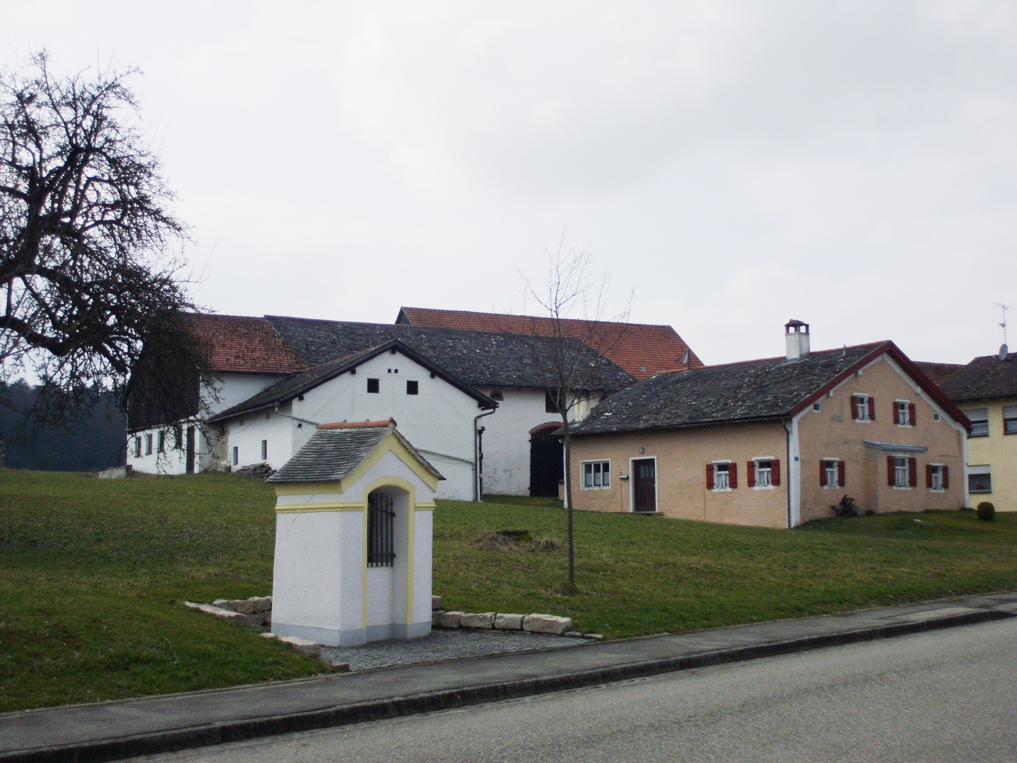 Schönau, Gemeinde Schernfeld im Landkreis Eichstätt (Bayern), Dreifaltigkeitskapelle am südlichen Dorfeingang